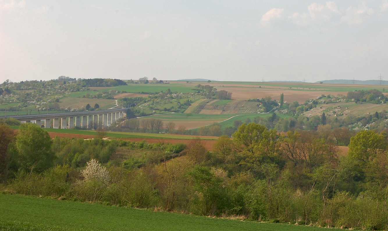 Enztal beim Leinfelder Hof – vom Burgstall Dauseck